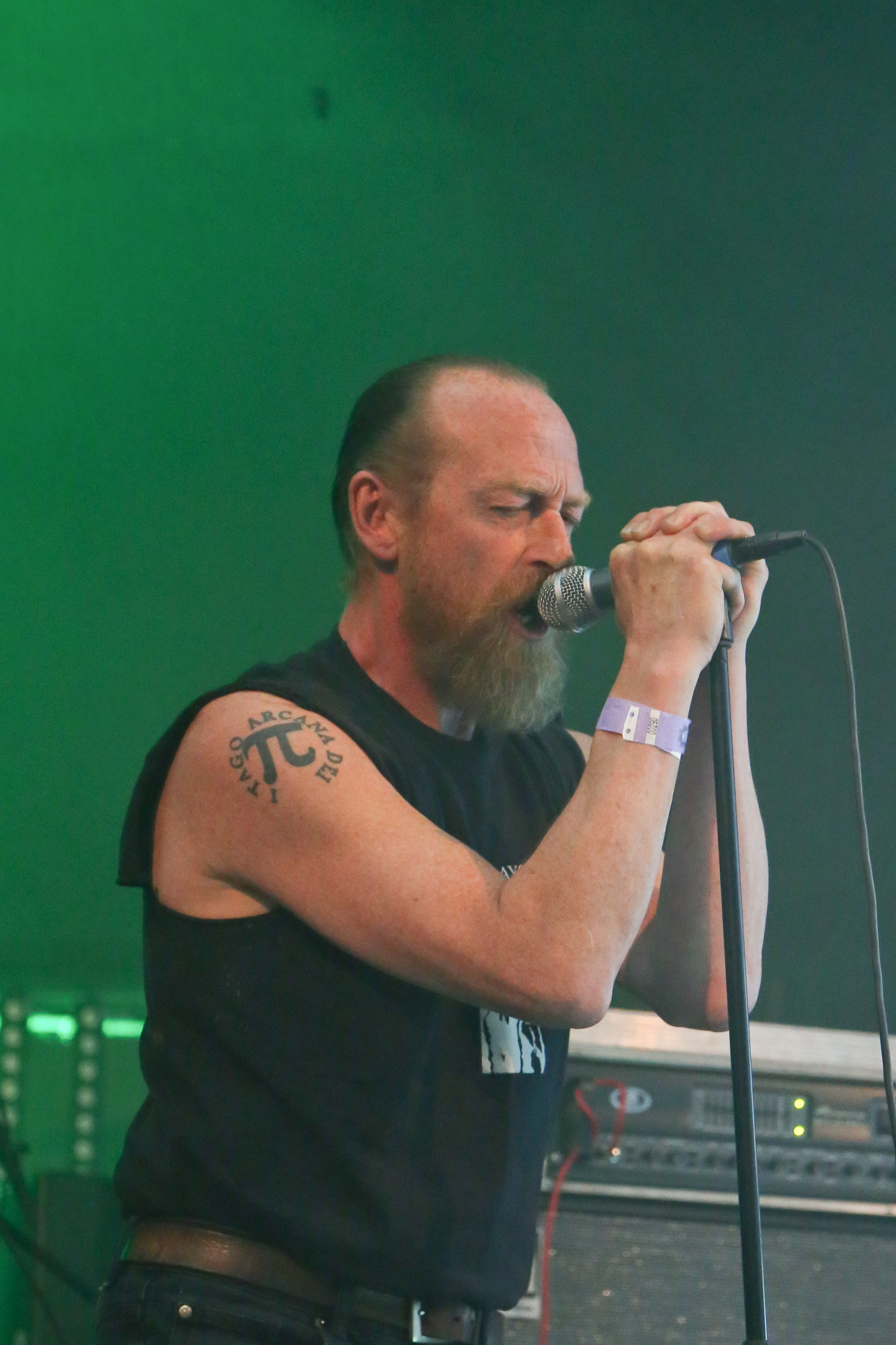 The James Rays Gangwar auf dem Wave-Gotik-Treffen 2016 im Felsenkeller.